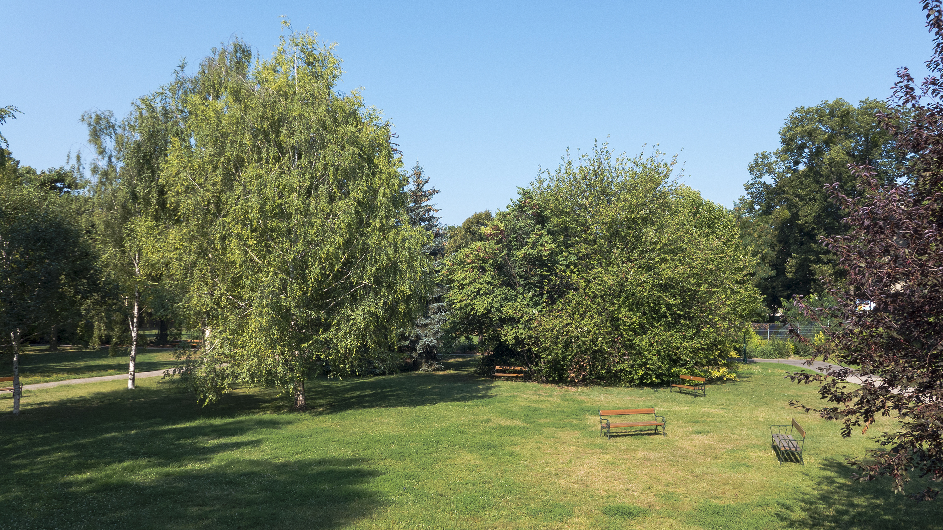 Währinger Park in Wien 18